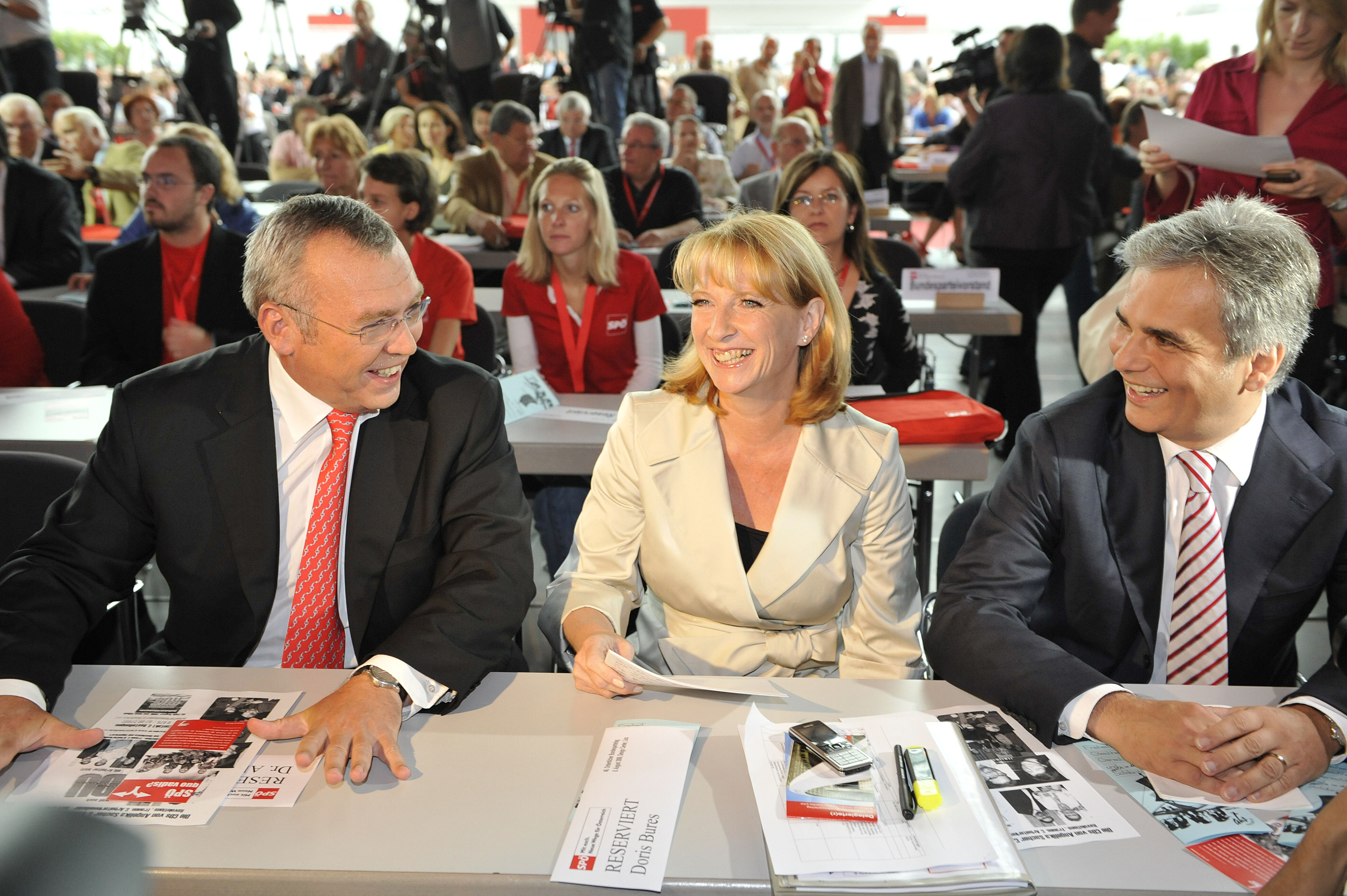 Alfred Gusenbauer, Doris Bures und Werner Faymann am 40. Ordentlichen Bundesparteitag 2008 im Linzer Design-Center. Foto: Johannes Zinner.